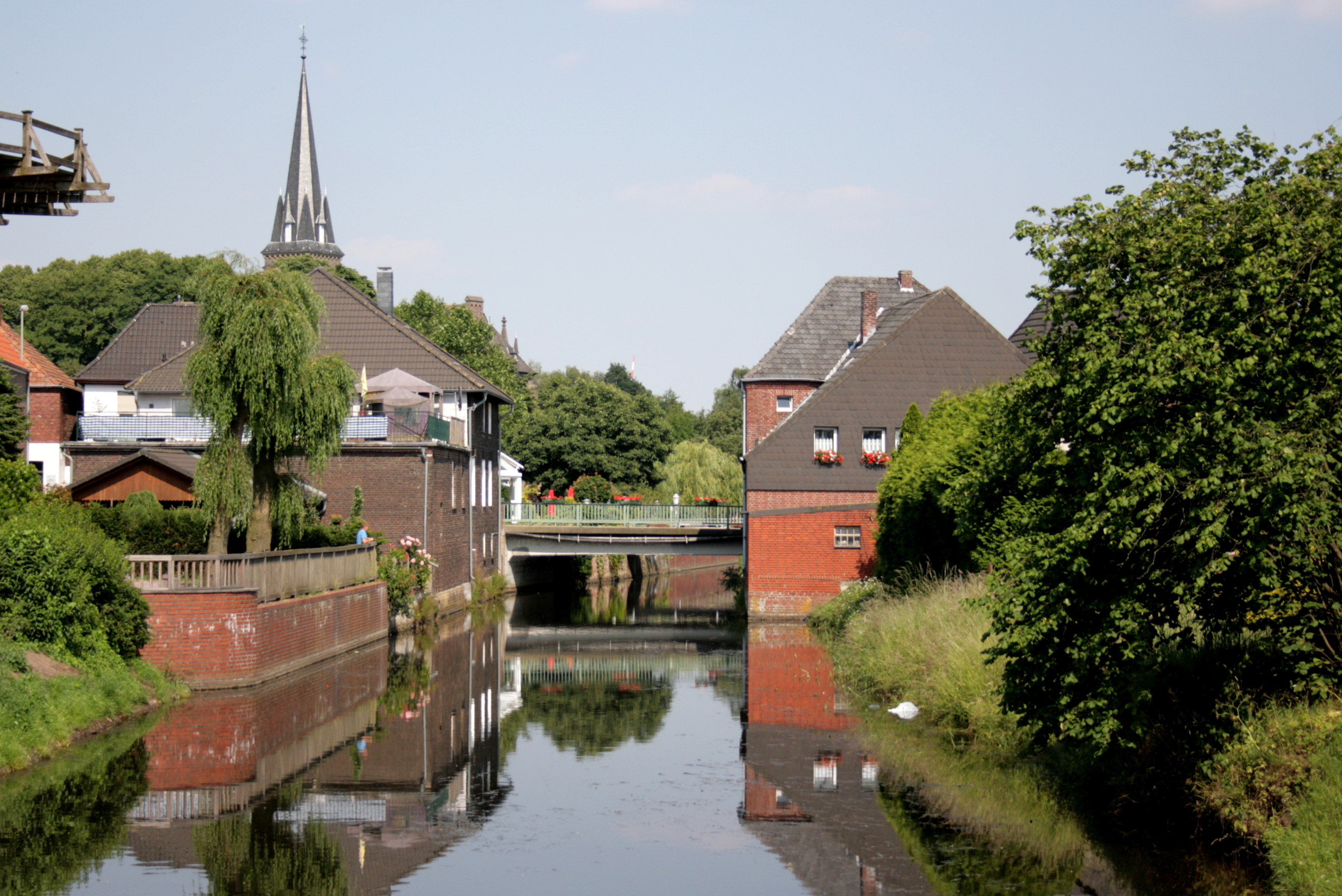 Issel in Werth, Isselburg, hinten die Brücke der Deichstraße